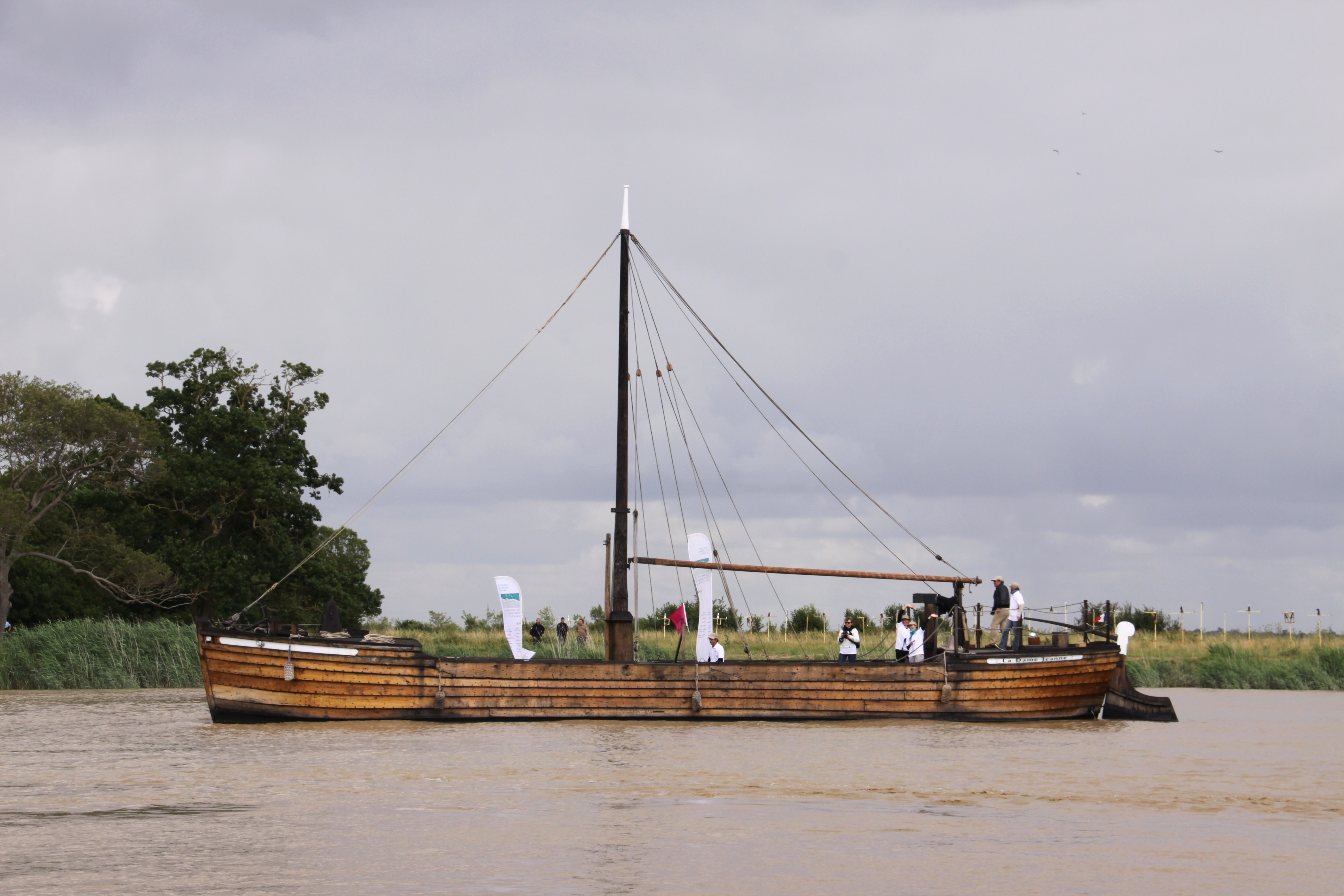 La gabare "La Dame Jeanne" remontant la Charente à Rochefort-sur-Mer durant la parade nautique de vieux gréements lors de la fête de la mise à l' eau de la frégate "L' Hermione" (réplique de "L' Hermione" de 1779). "La Dame Jeanne" est une réplique des bateaux de travail du 19ème-20ème siècles (gabare de Charente type Port d' Enviaux). Ce genre de bateau fluvial était utilisé pour transporter les matériaux et le cognac. "La Dame Jeanne" a été construite en 2002. Longueur hors tout: 23,05 mètres, largeur: 4,98 mètres, tirant d' eau: 0,65 mètres, déplacement: 26 tonnes. Coque en chêne à clins. Immatriculation: BX 1873 F. Port de mouillage: Cognac. Rochefort-sur-Mer, Charente Maritime, France.